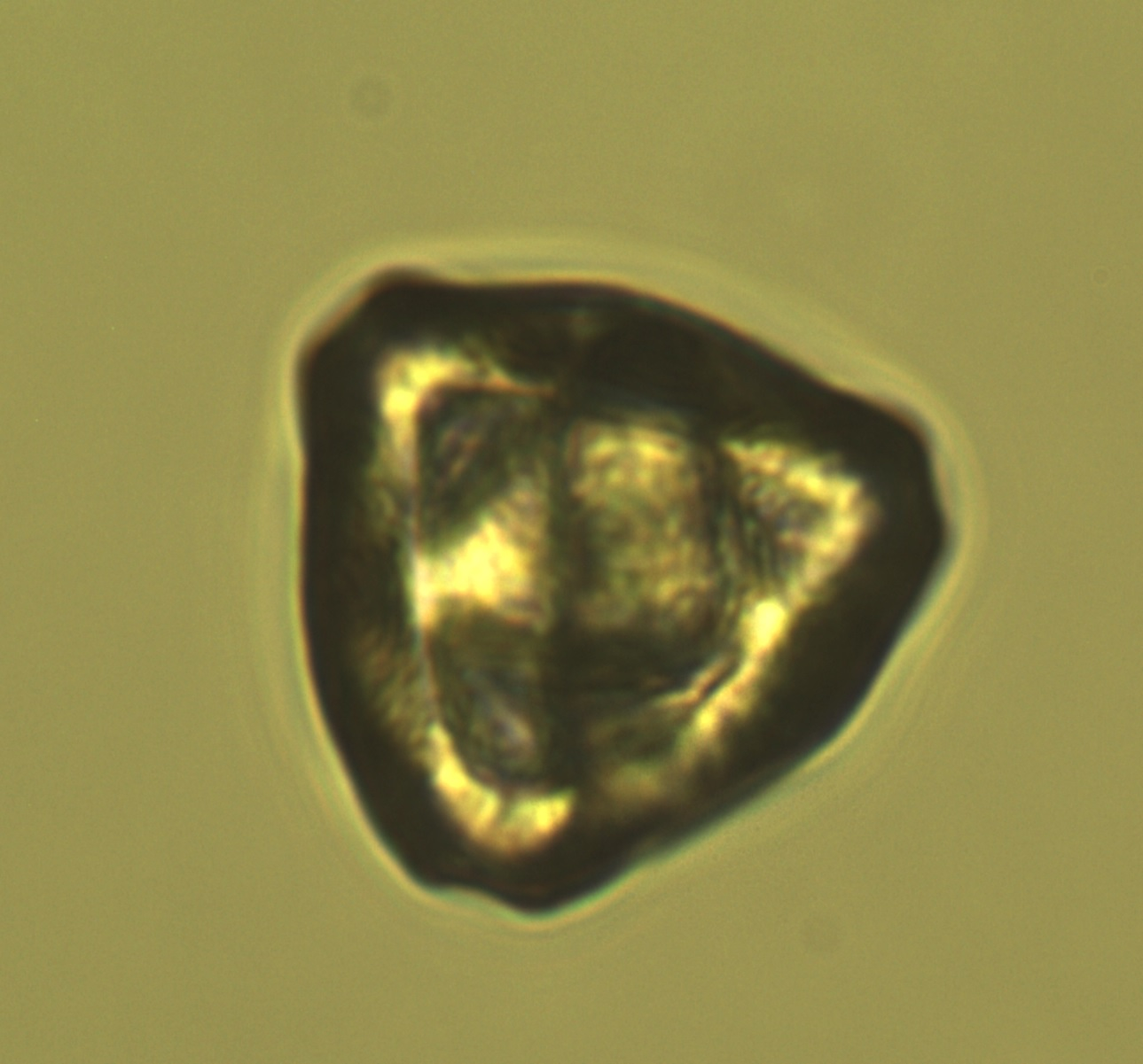 Corylus avellana Pollenkorn 400x in Glycerin